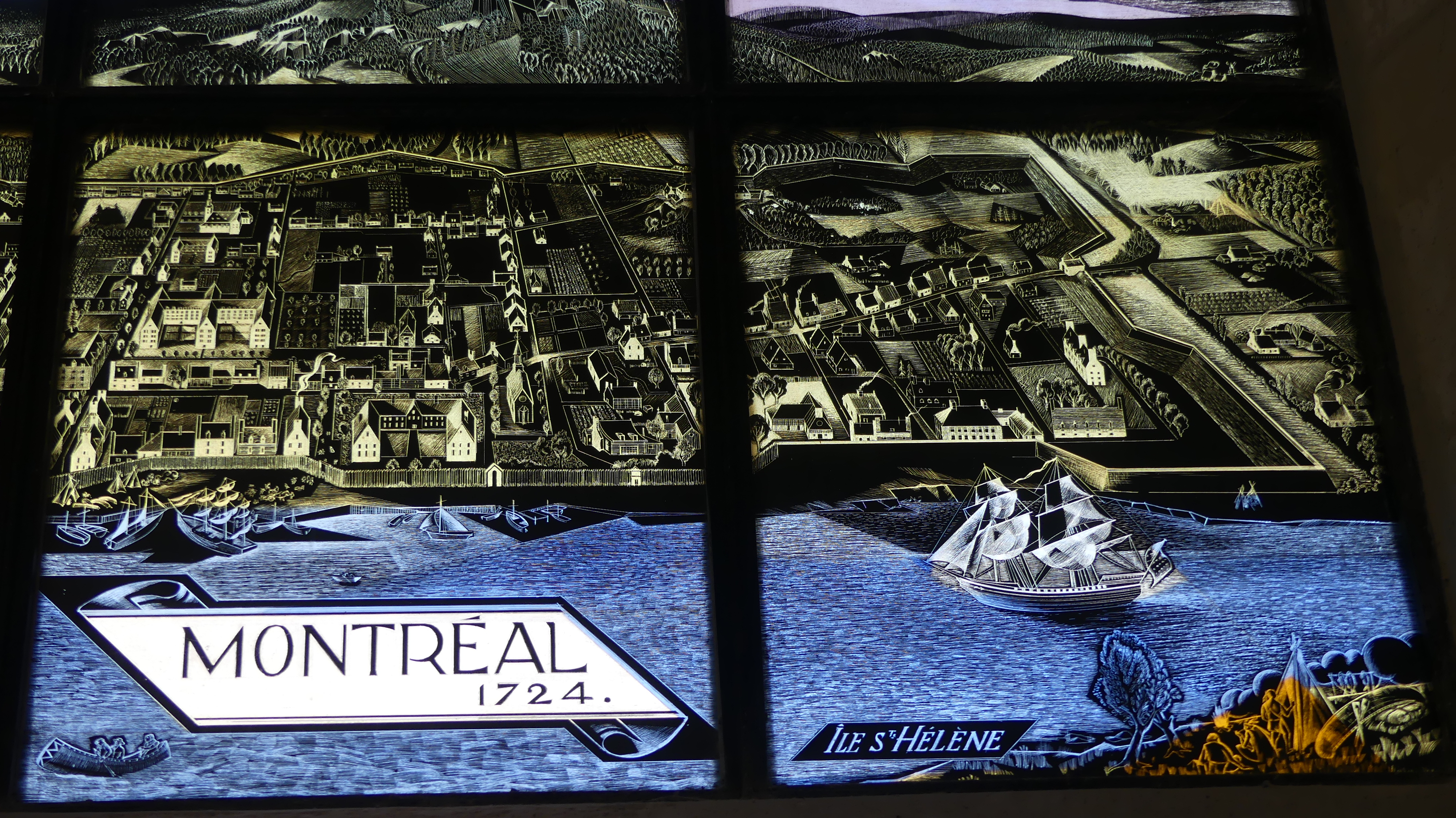 Détail d'un des vitraux de l'église Saint-Pierre-et-Saint-Paul